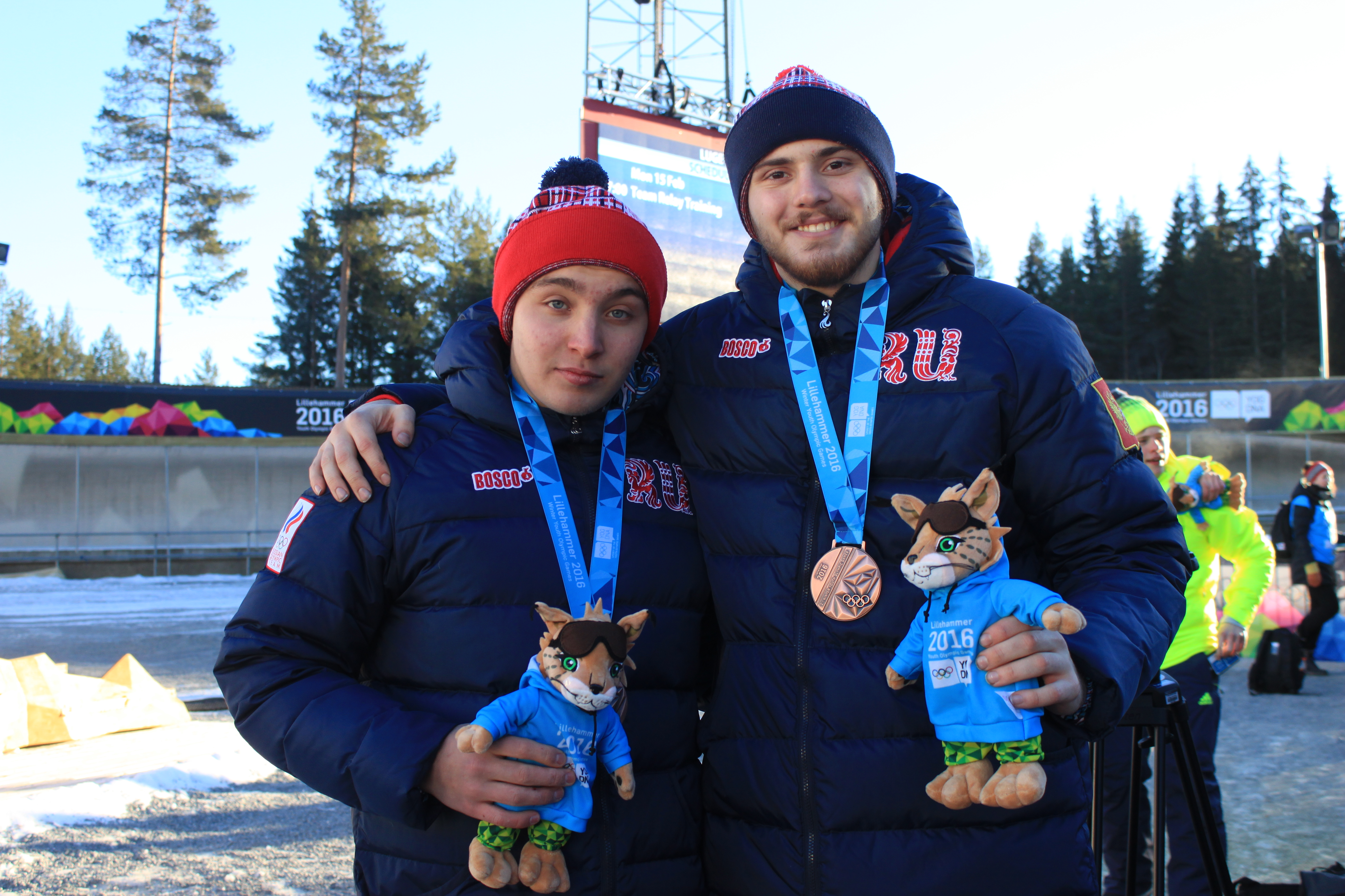 Vsevolod Kasjkin og Konstantin Korshunov under medaljeseremonien i Lillehammer.